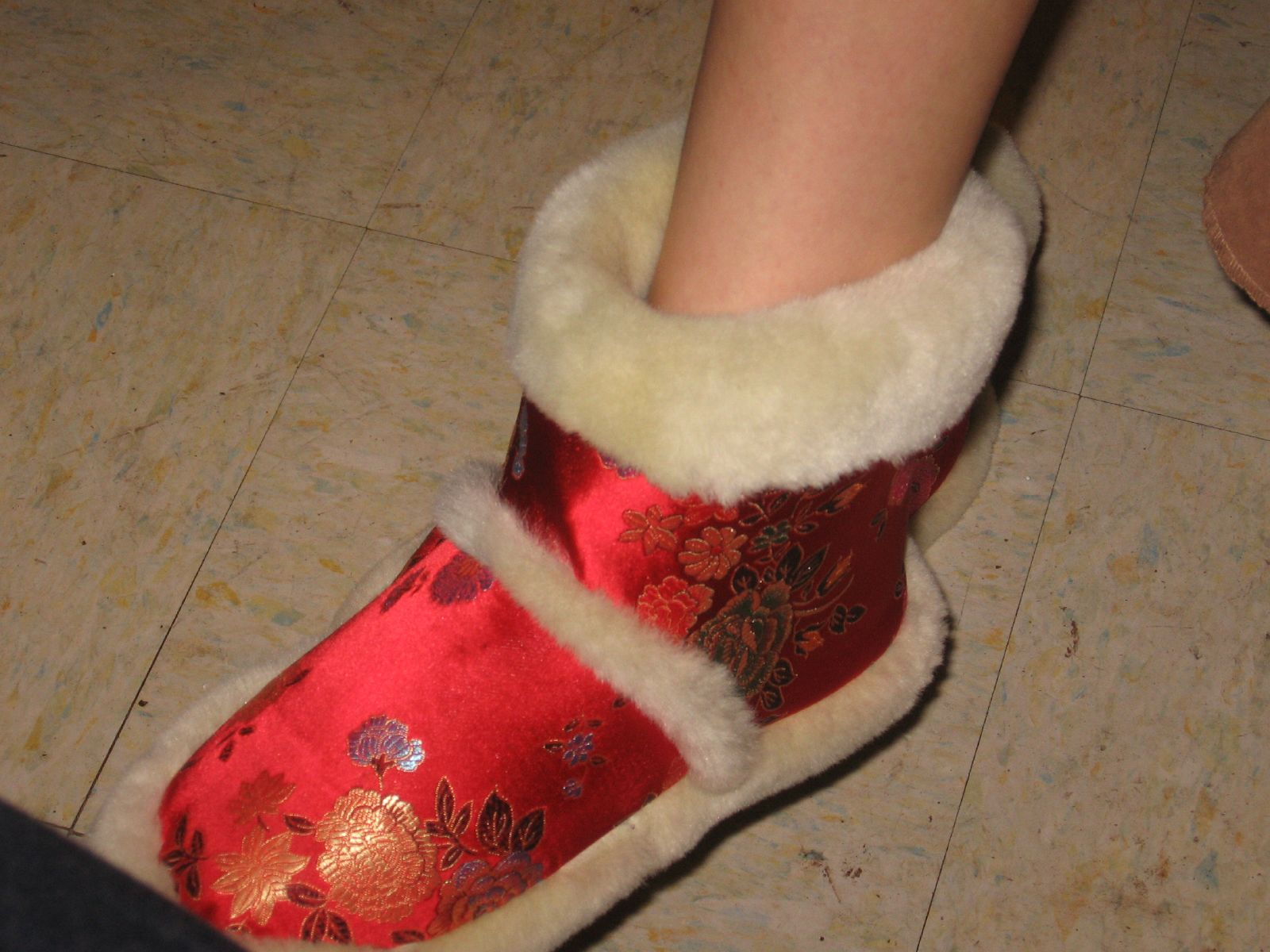 נעלי בית בגזרת מגפיים, מעוצבות מבד סאטן ומעוטרות בפרווה.